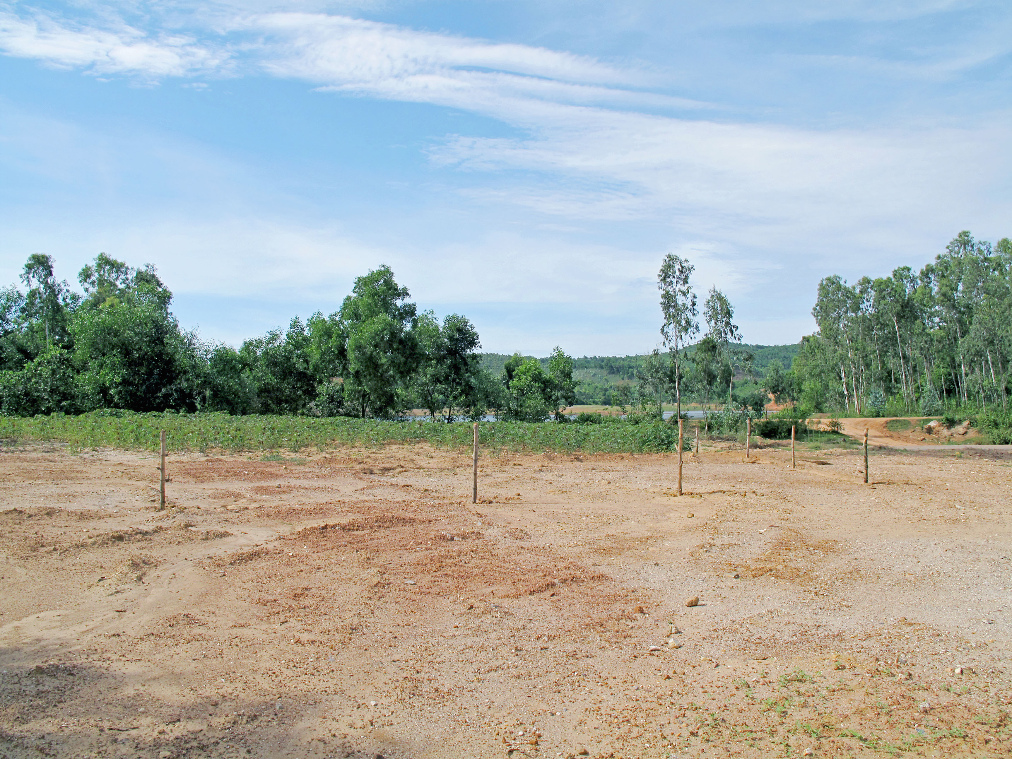 Bình Thanh Đông, Bình Sơn, Quảng Ngãi, Vietnam